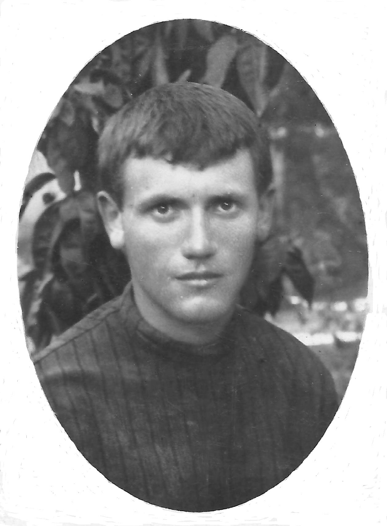 אהרון שידלובסקי היה איש העלייה השנייה וממייסדי קבוצת כנרת. בצעירותו כנראה שעשור השני של המאה העשרים